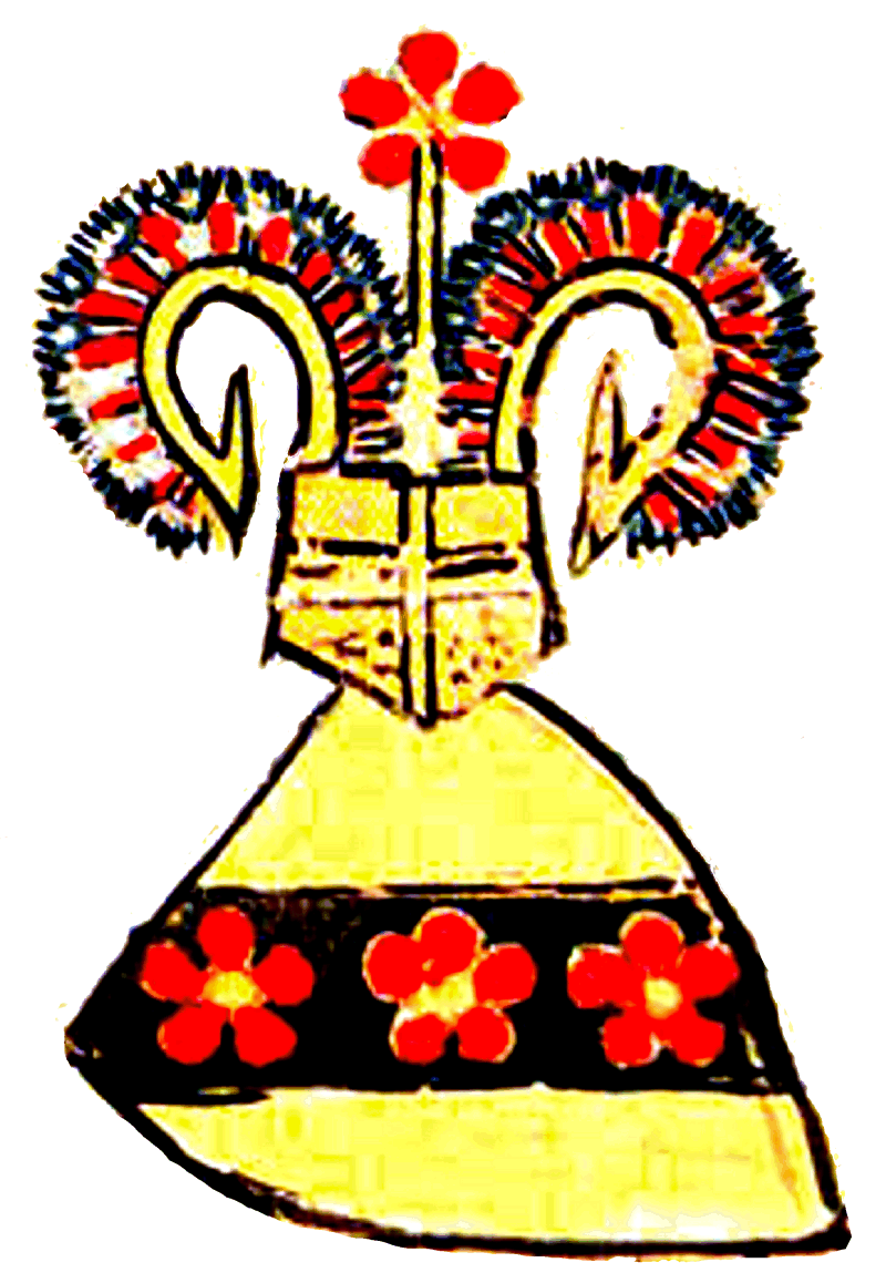 Wappen der Babonen (Ausschnitt aus Weingartner Liederhandschrift Seite 18